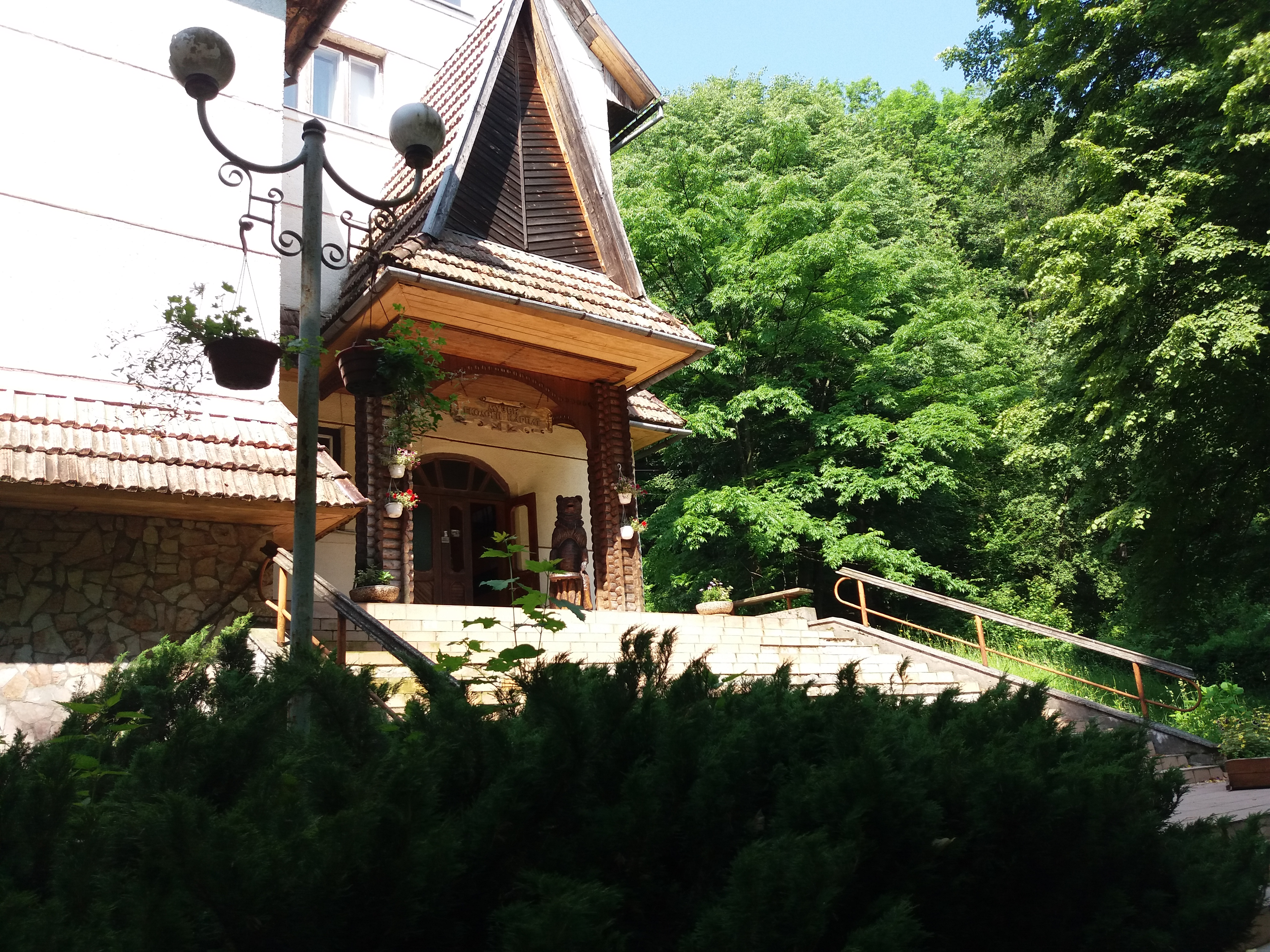 Музей екології гір. В межах Карпатського біосферного заповідника.